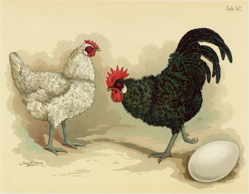 Strupp-Huhn. Gallus dom. crispus. Frizzled Fowl. Poules frisèe.